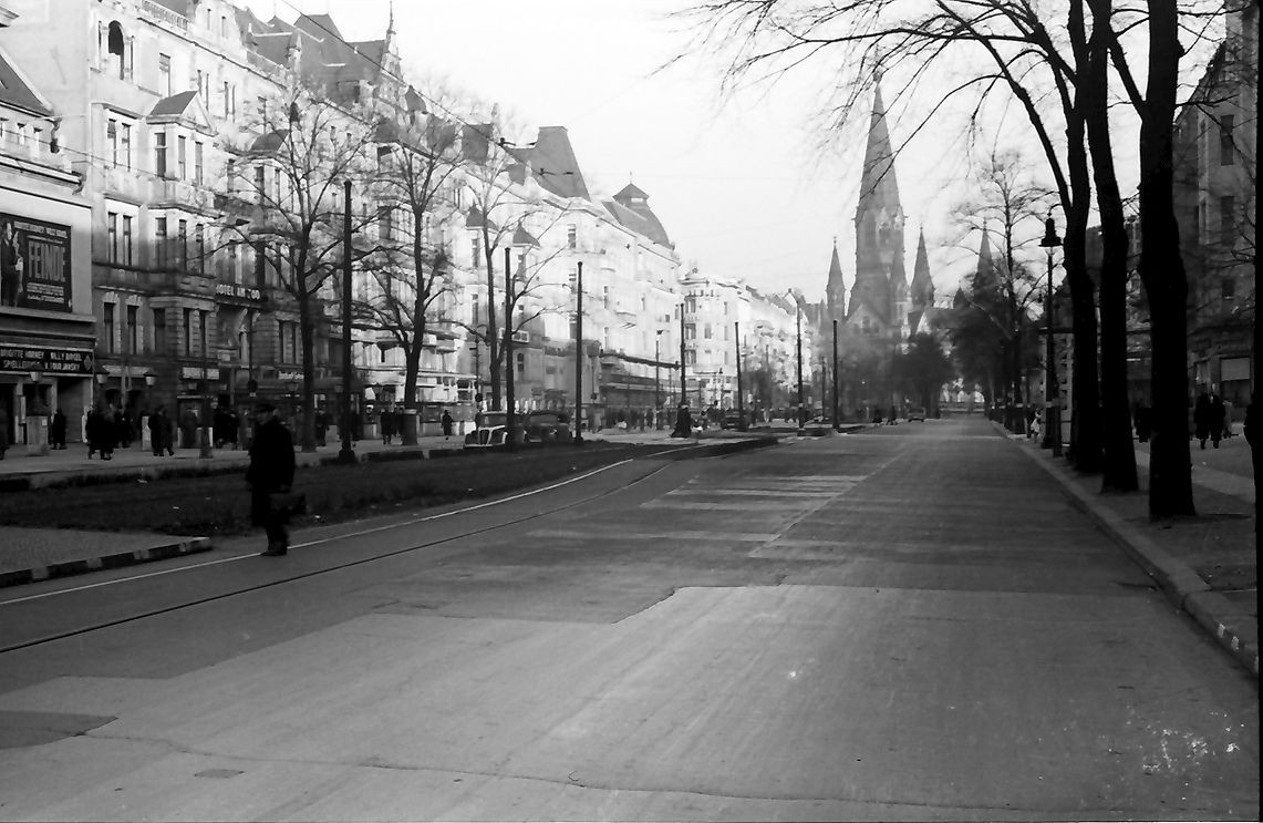 Kurfürstendamm in Richtung Kaiser-Wilhelm-Gedächtniskirche in Berlin-Charlottenburg.